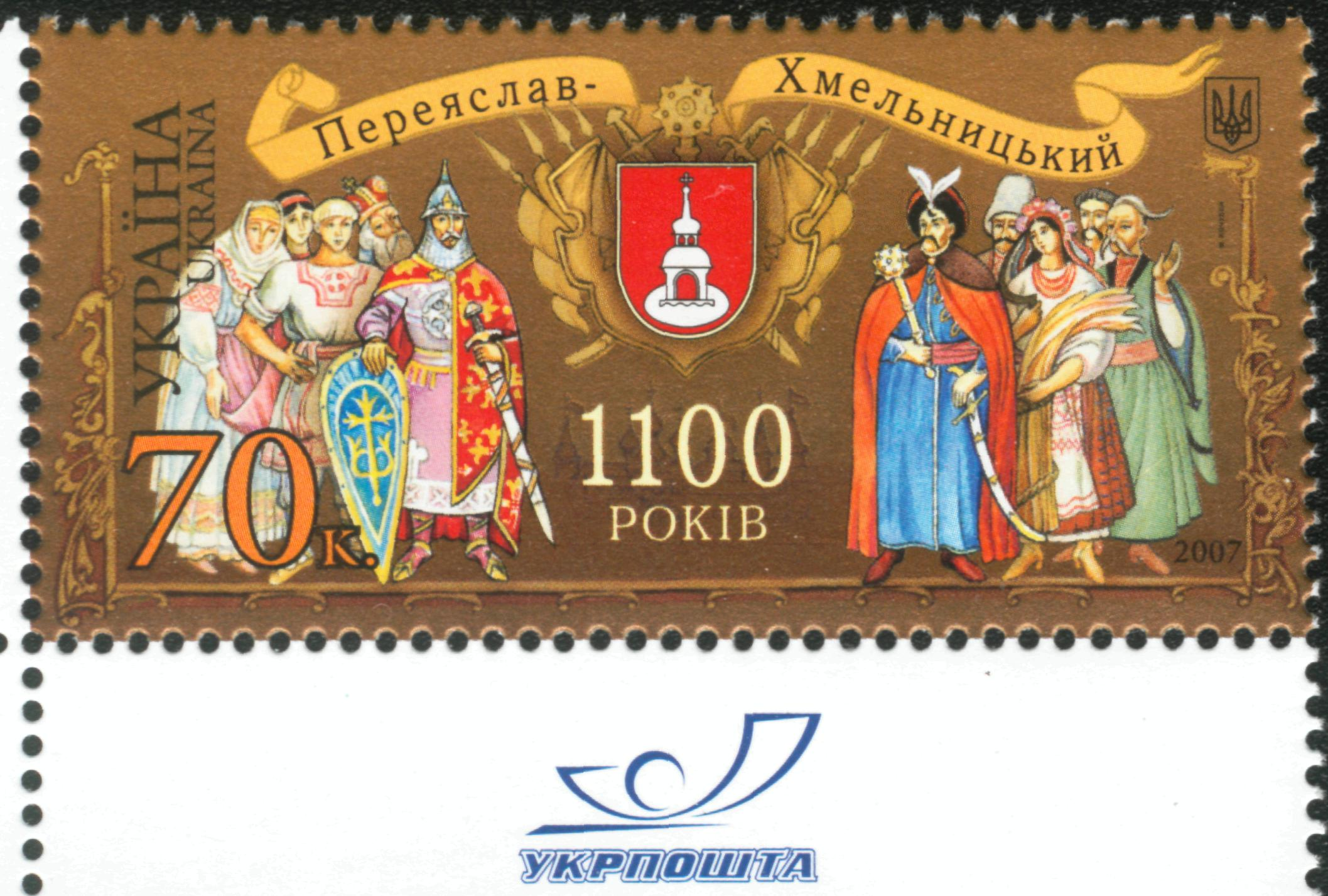 1100 лет Переяслав-Хмельницкому . Марка Украины 2007 года.